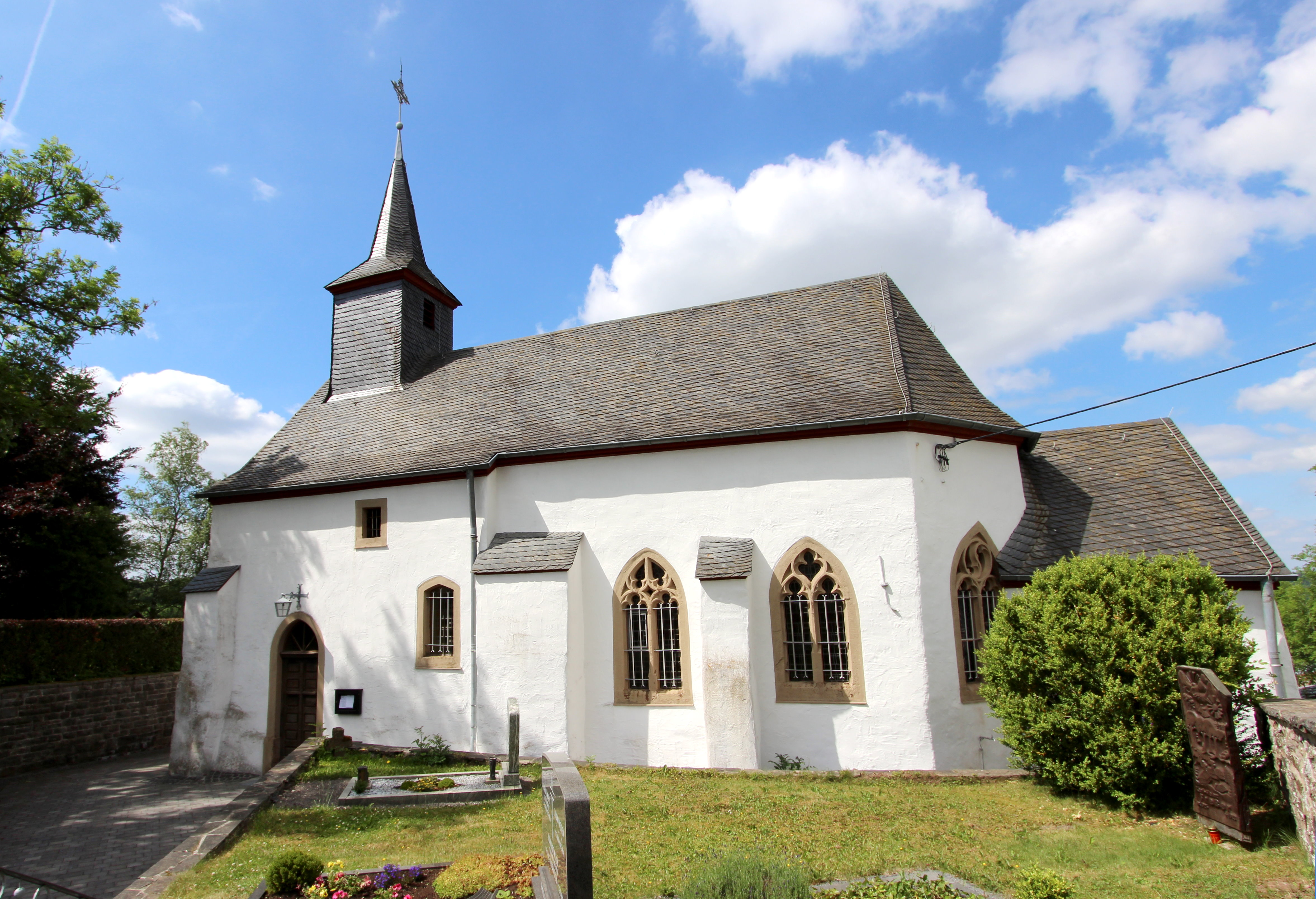 54589 Kerschenbach; Ormonter Straße 10. Spätgotischer Saalbau, mehrfach verändert (unter anderem 1681); Kirchhof, Grabkreuze in der Umfassungsmauer; Gesamtanlage. Aufnahme von 2017.